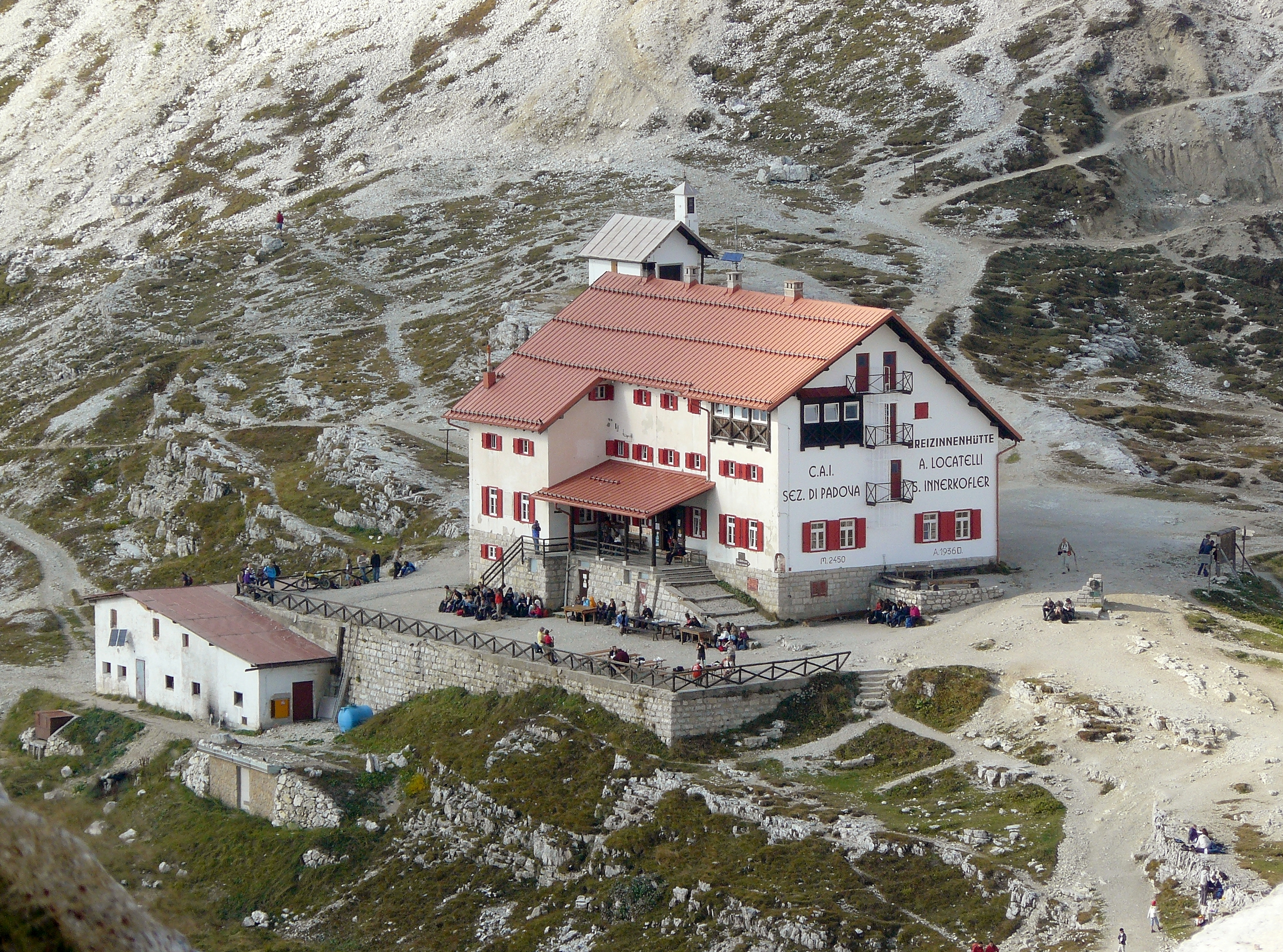 Dreizinnenhütte